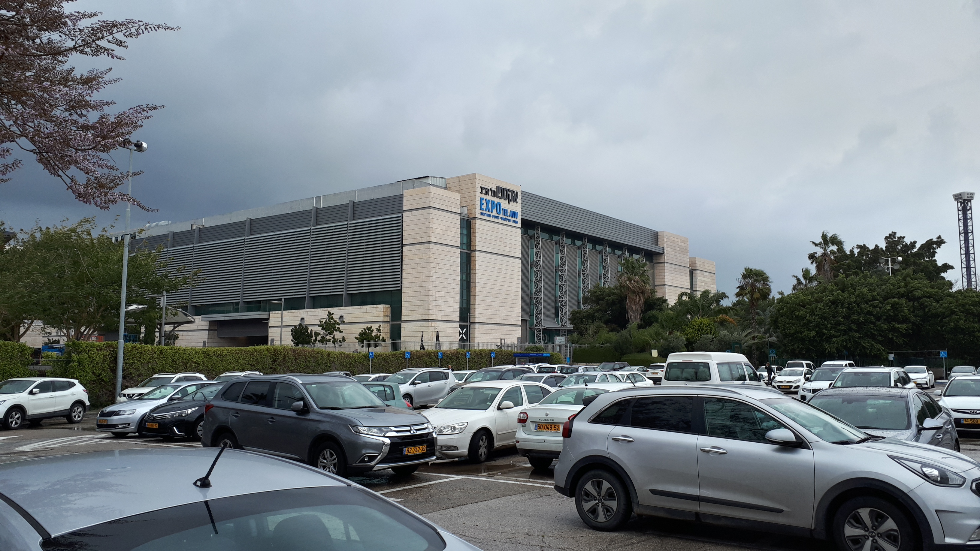 ביתן 2, גני התערוכה, תל אביב, פברואר 2019